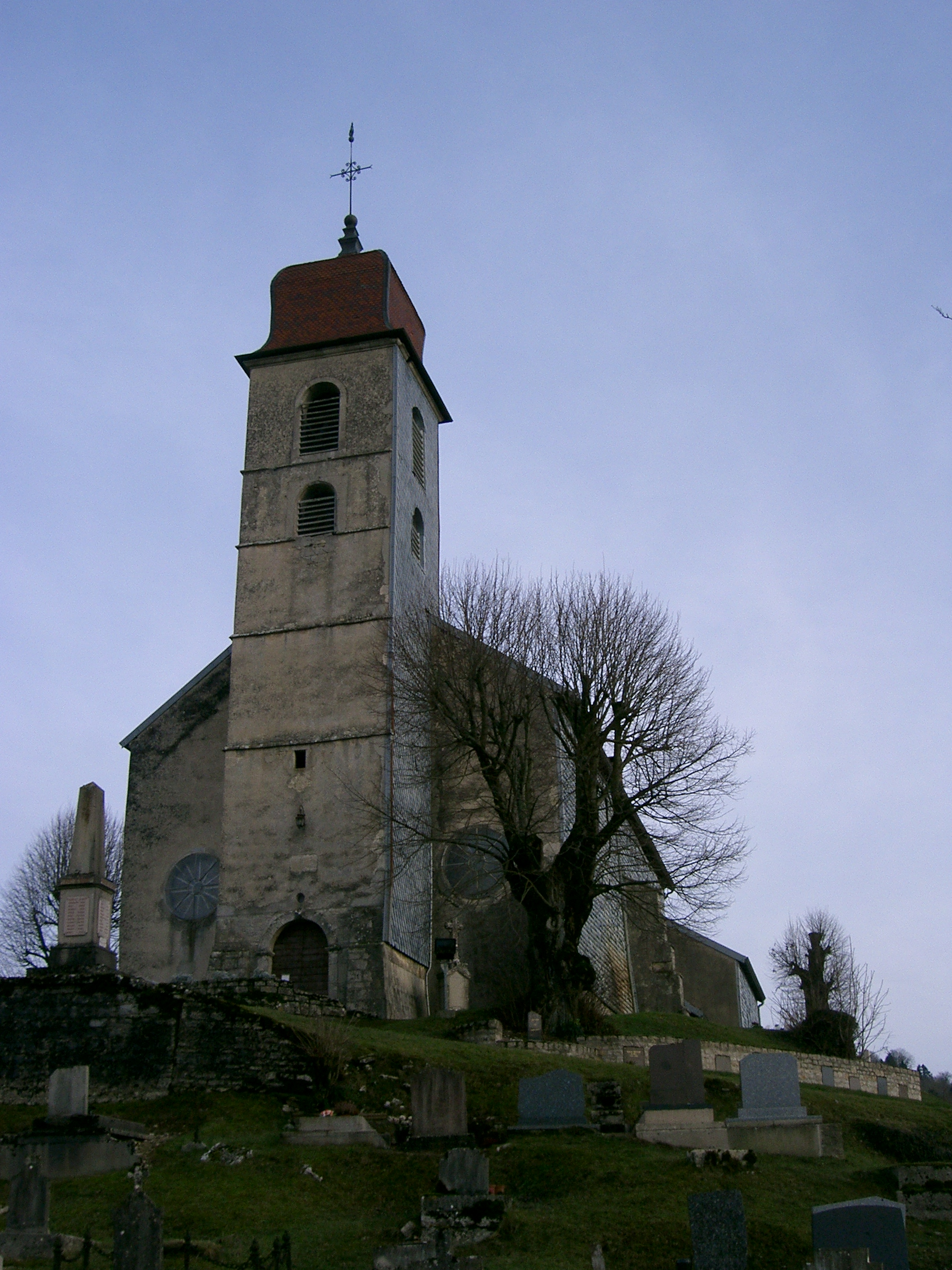 clocher de l'église de Monnet-la-Ville (département du Jura, France)